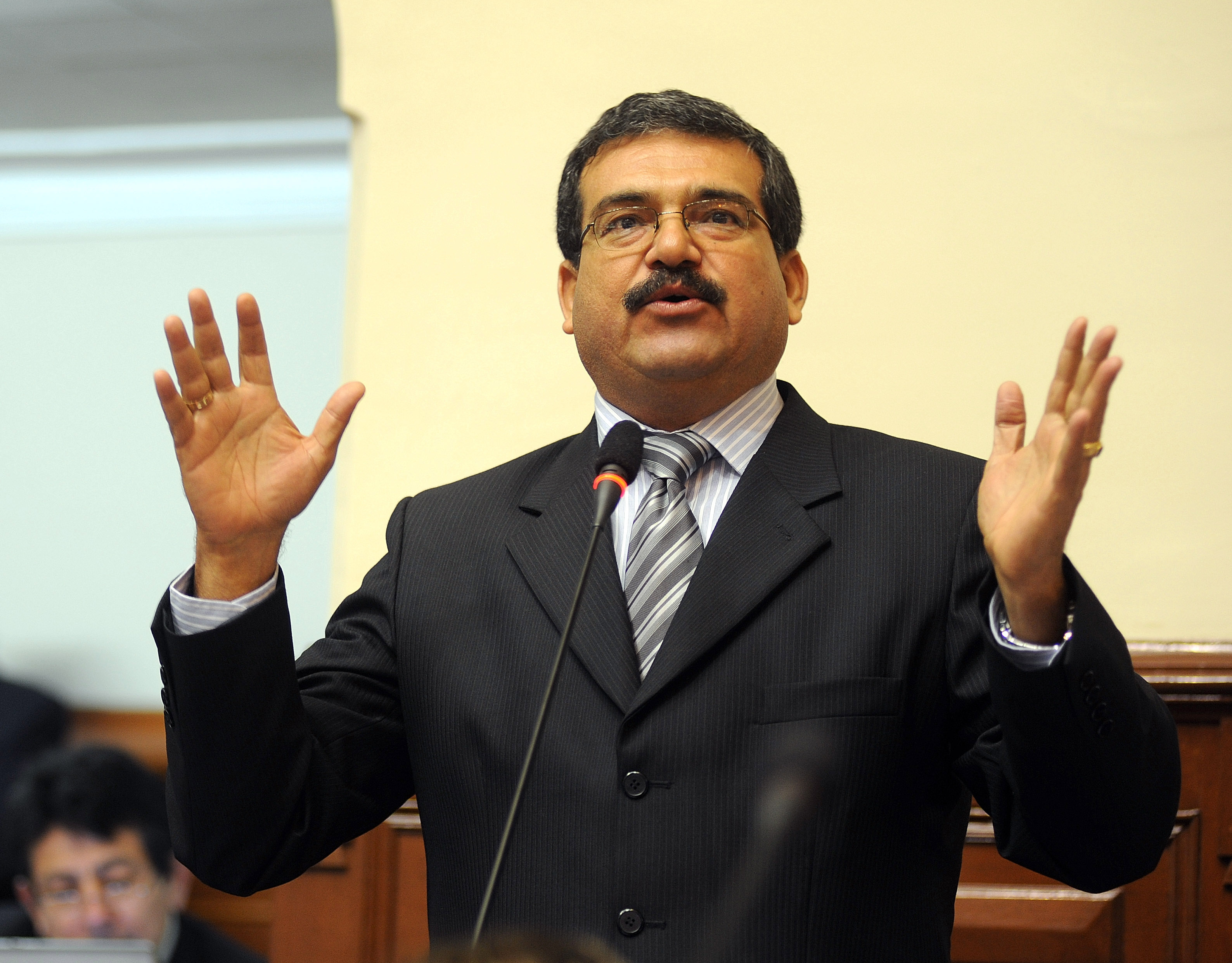 El legislador Carlos Cánepa expresa su posición en el debate parlamentario realizado esta mañana por el Pleno congresal.